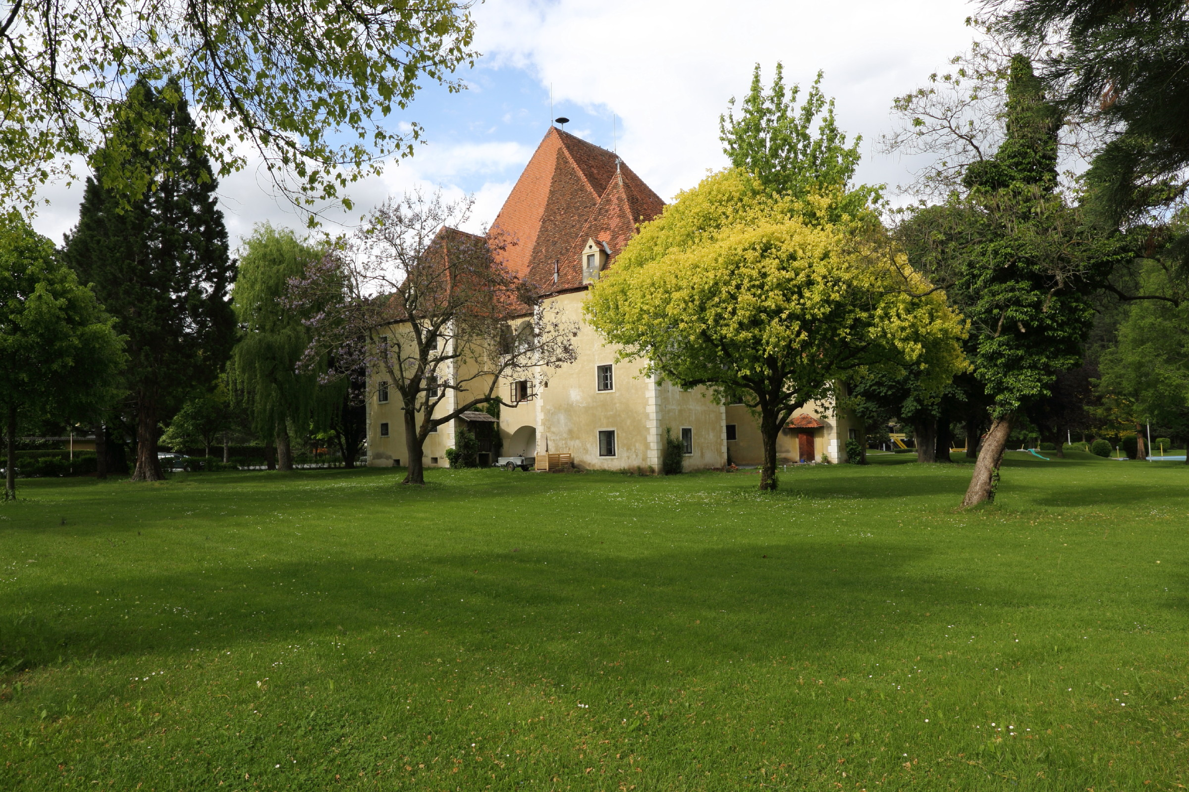 Schlosspark Bärnbach This media shows the Geschützter Landschaftsteil in Styria with the ID GLT_1536.